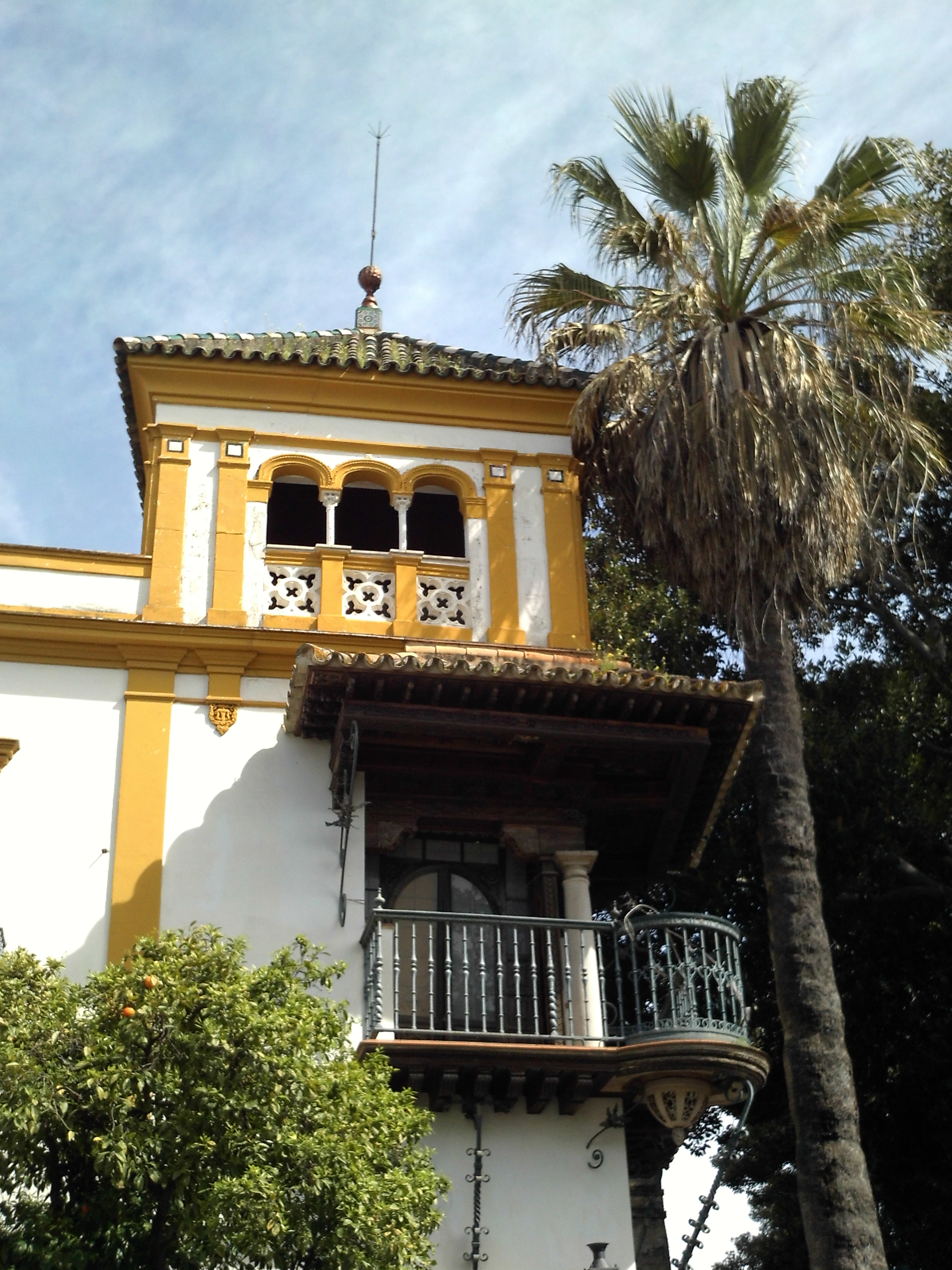 Balcón de una casa de la plaza Alfaro, barrio de Santa Cruz, Sevilla, Andalucía, España.